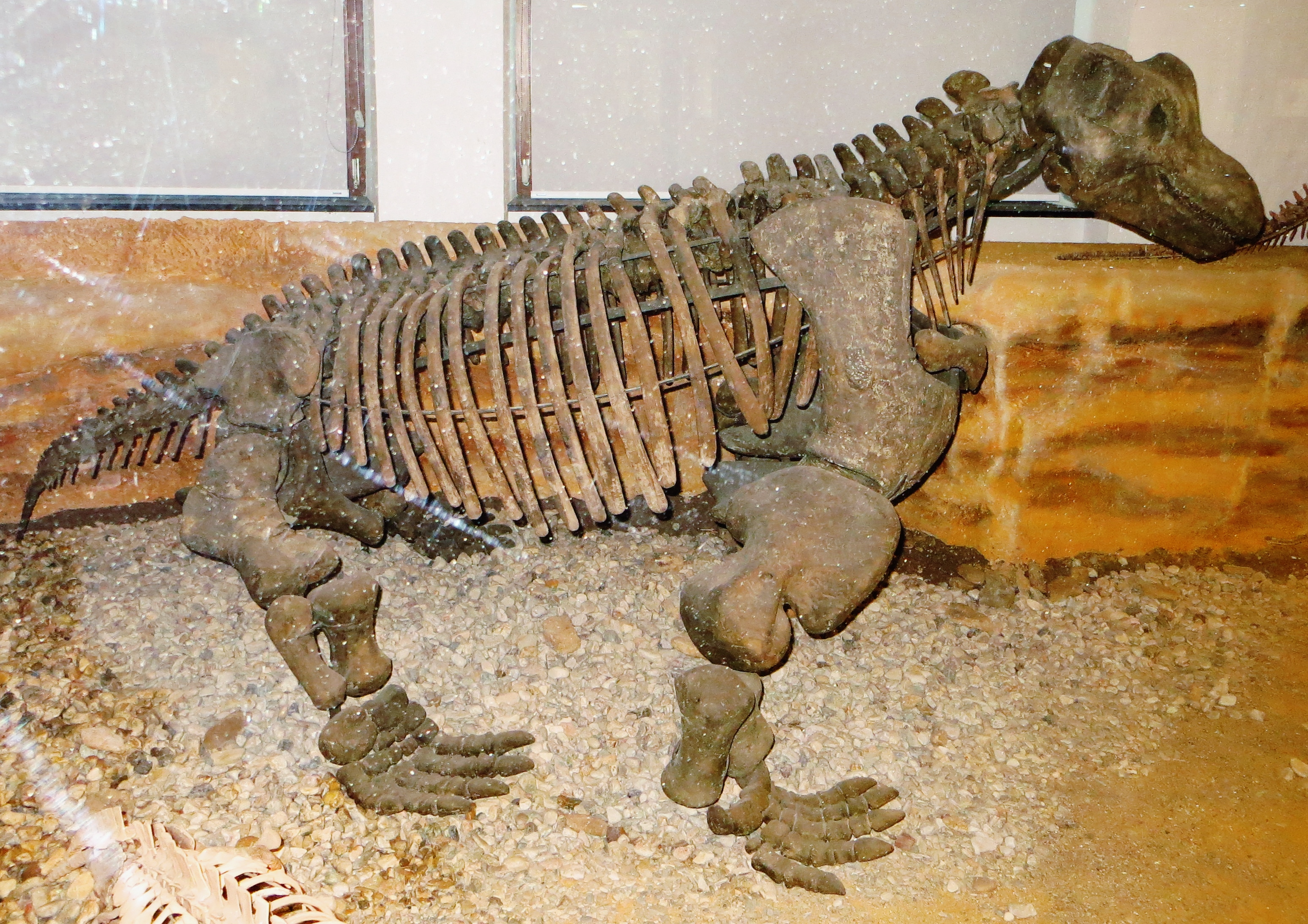 Fossil of Keratocephalus, an extinct therapsid - Took the picture at Museum of Paleontology, Tuebingen